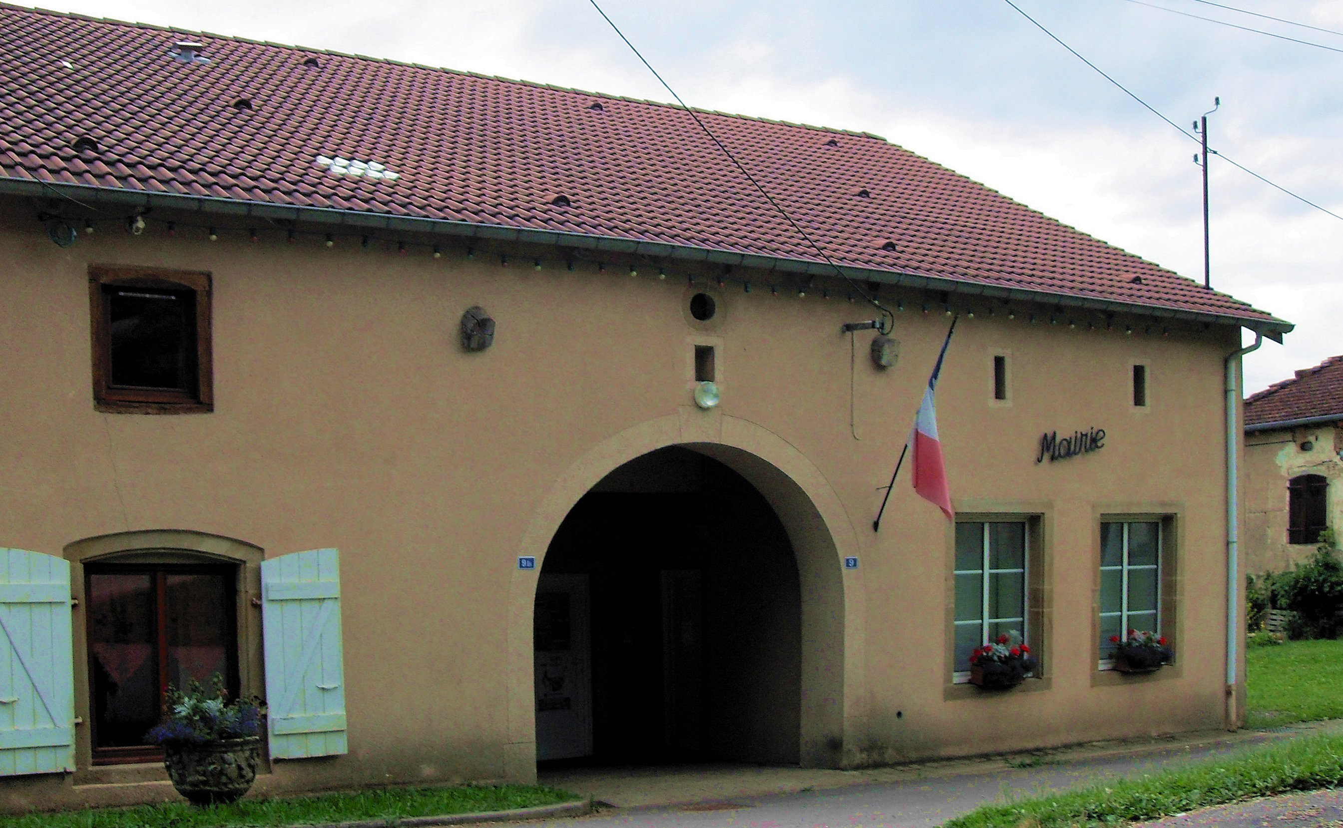 La mairie de Vomécourt-sur-Madon